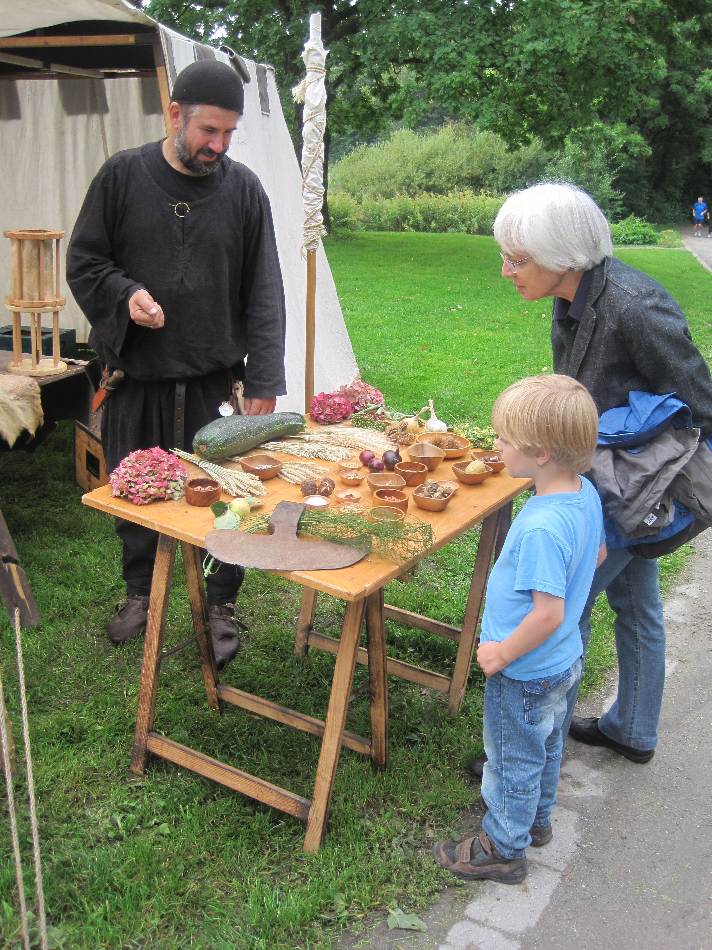 Stand der "Templer Komthurey Mark" auf dem Burghügel Mark am Tag des offenen Denkmals, 12. September 2010.